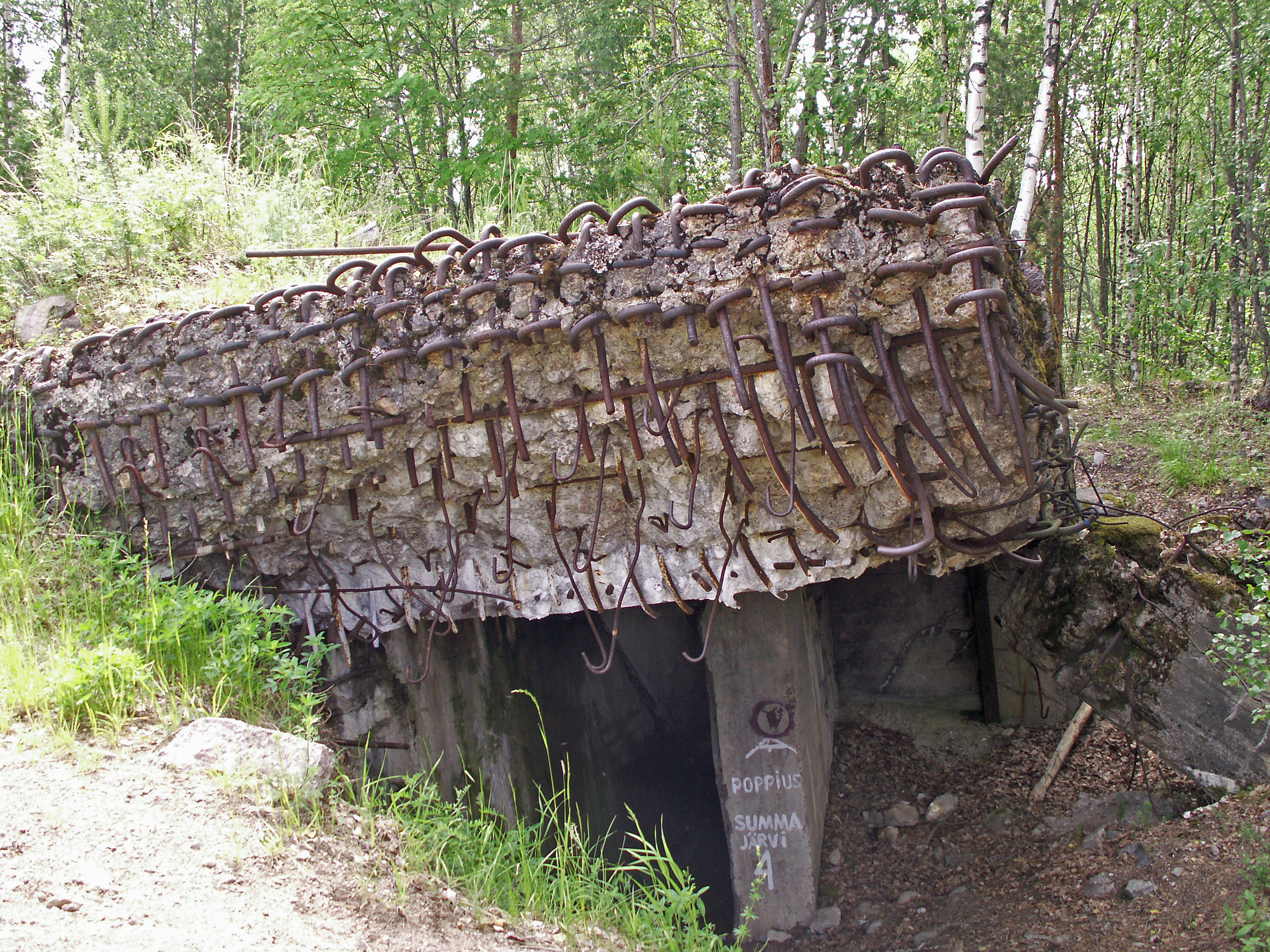 Комплекс оборонительных сооружений линии Маннергейма: между Финским заливом и Ладожским озером, Выборгский район / Приозерский район, Ленинградская область